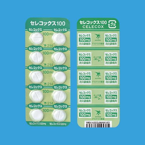 ファイザー株式会社のセレコックス錠100mg（中枢神経用薬）